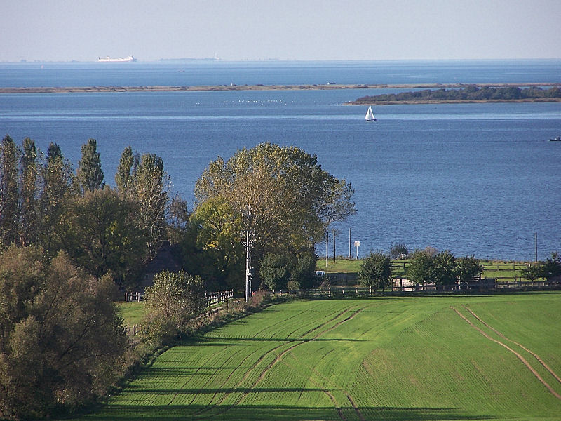 Blick vom Scharberg über das Salzhaff Richtung Fehmarn